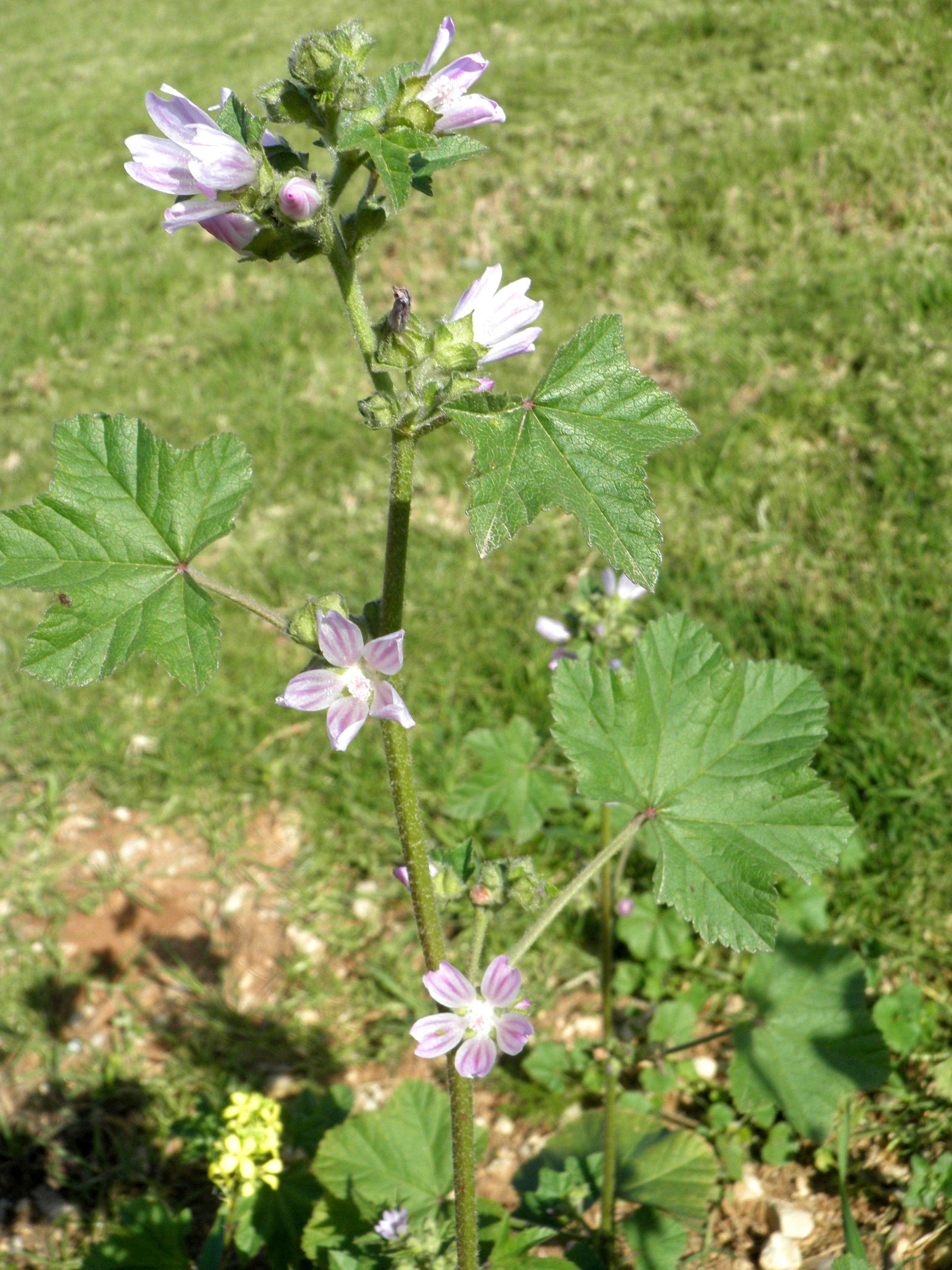 flowers חלמית מצויה